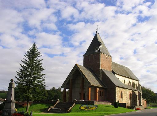 Eglise de Bailly-en-Rivière